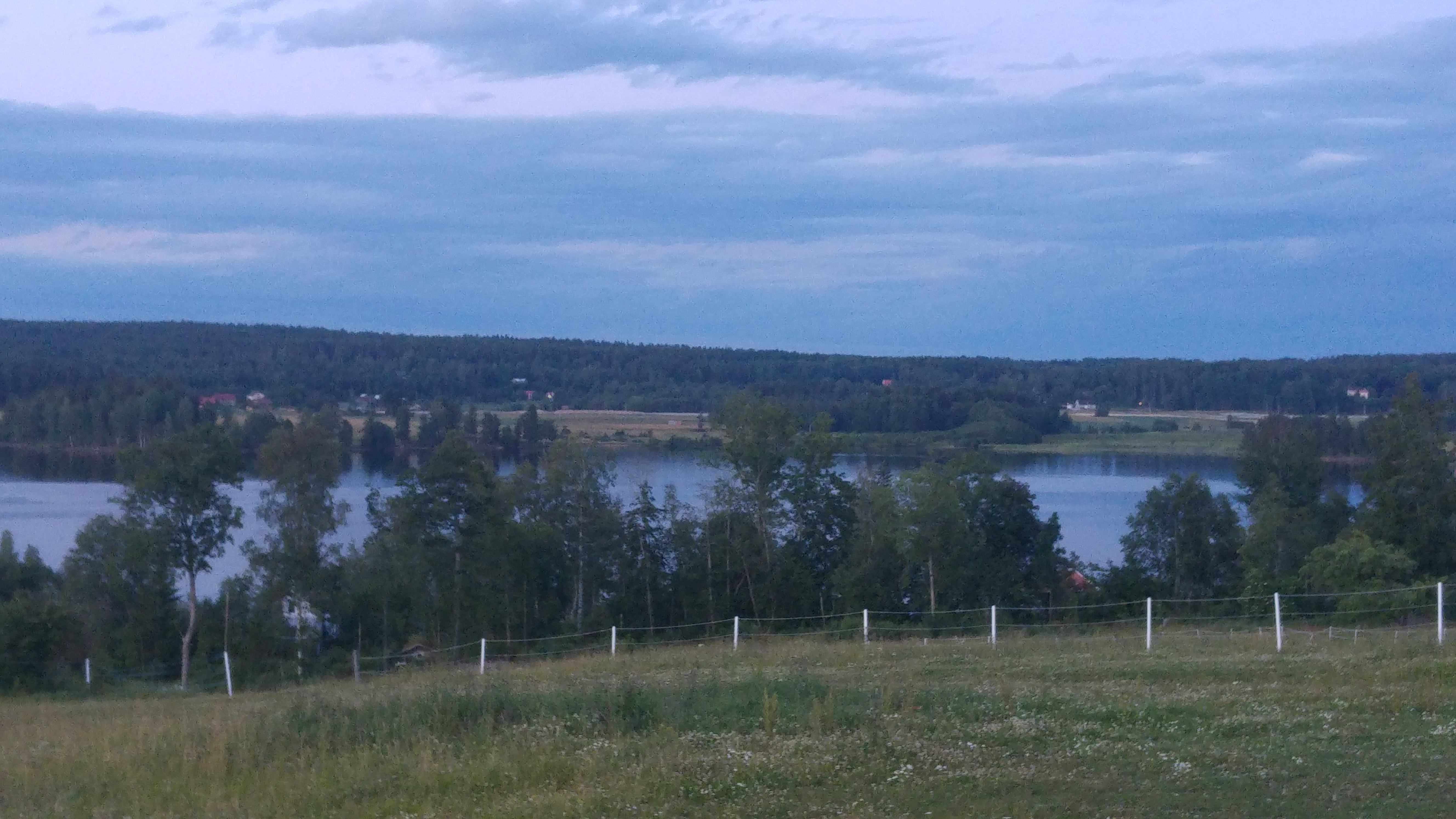 Vy över sjön Råsvallen från byn Snuggan